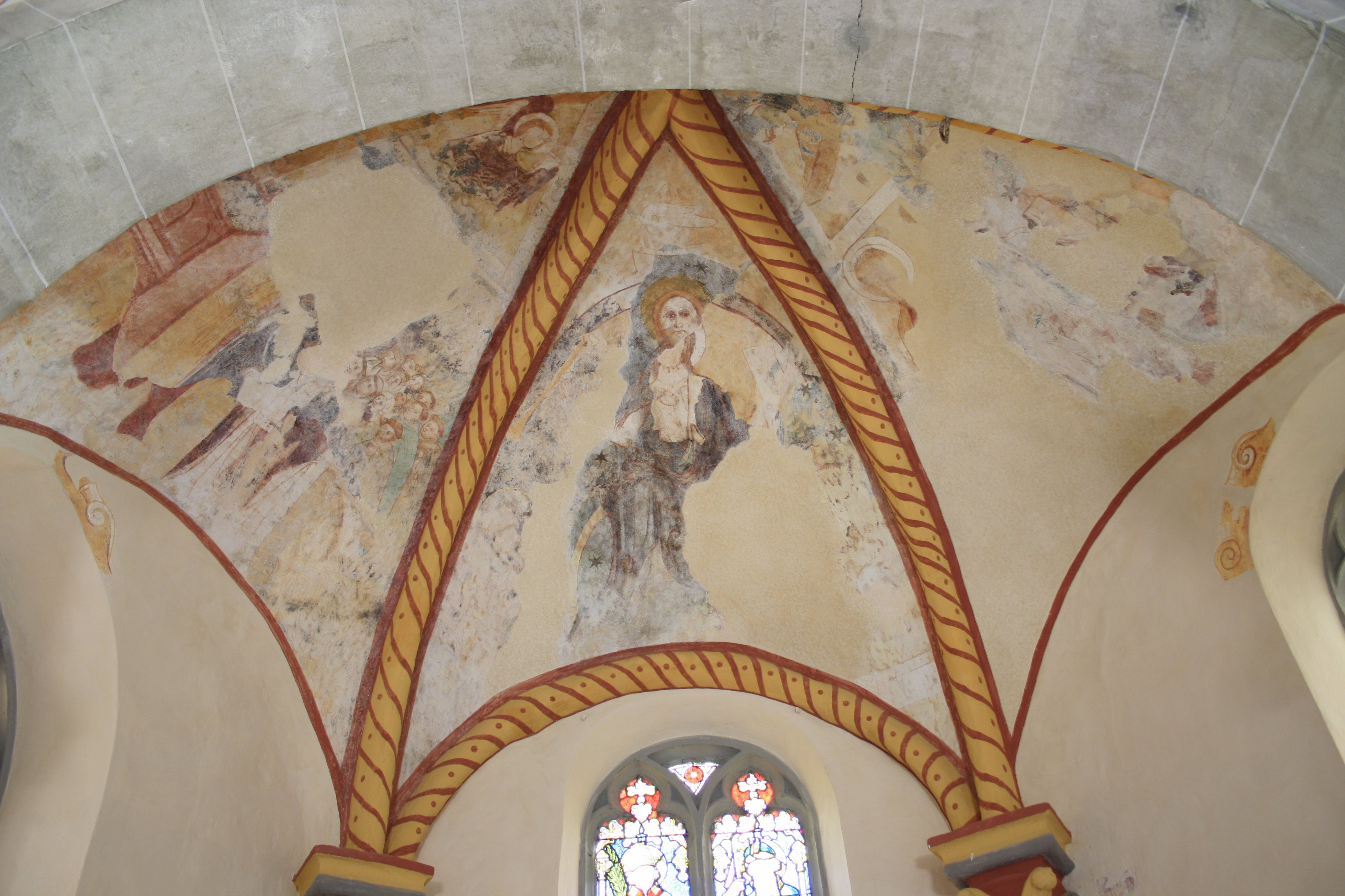 Clemenskapelle bei Trechtingshausen